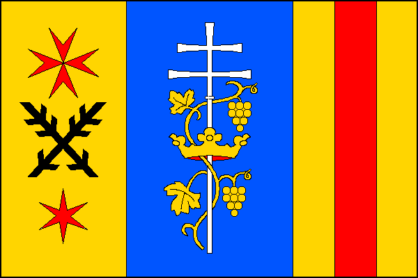 vlajka, Rybníky, okres Znojmo